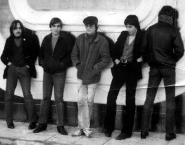 Formación original de La Banda de Gaal. Cox (Alicante). 1979. Remi Carreres, José Luis Macías, Gabotti, Luis Badenes y Gonzalo Díaz (de espalda).